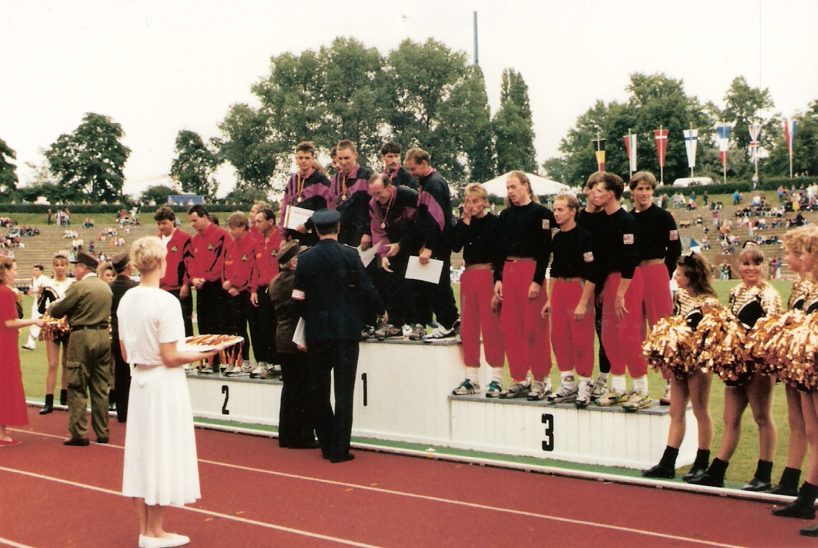 Berlin 1993: X. Internationale Feuerwehr-Sportwettkämpfe, Siegerehrung Disziplin Löschangriff FF – 1. Platz: Mannschaft FF Beselich-Obertiefenbach